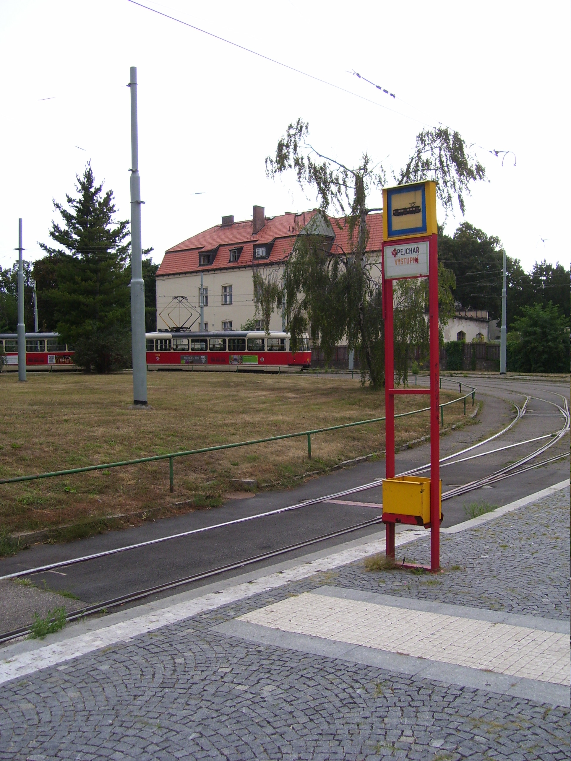 Praha, tramvajová smyčka Špejchar, výstupní zastávka